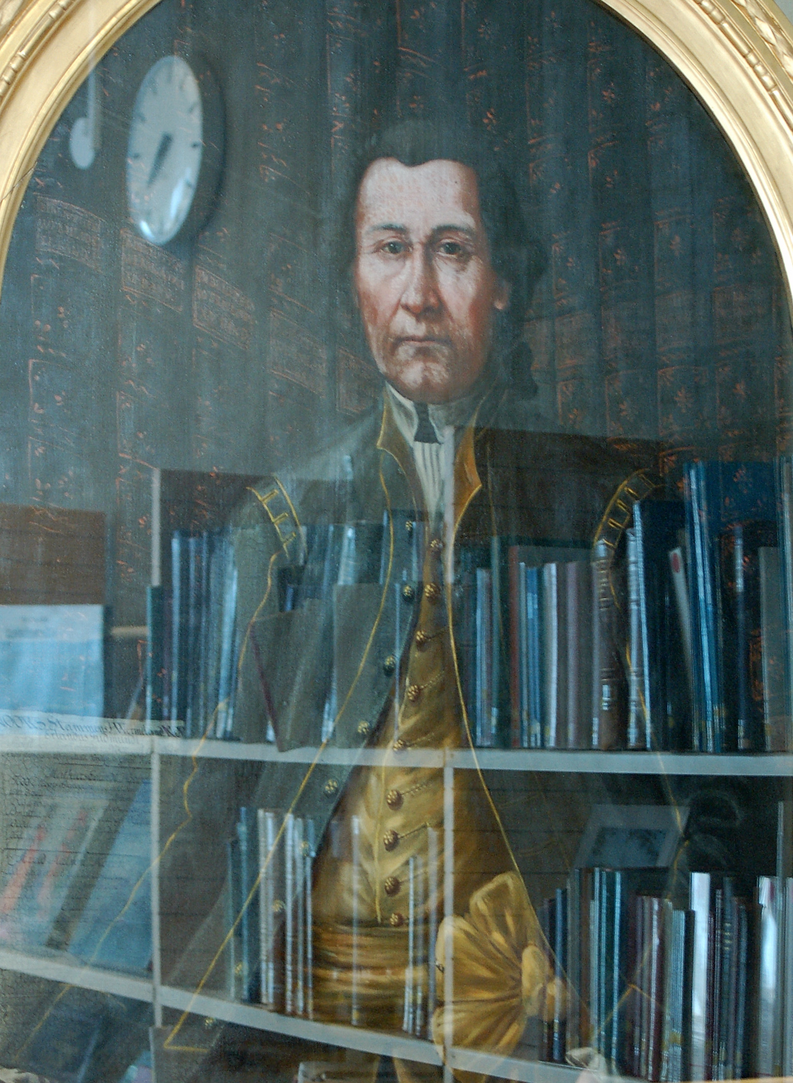 Fredrik Frysell (1724-1805) porträtt i Värmlandsrummet på Karlstads Stadsbibliotek.